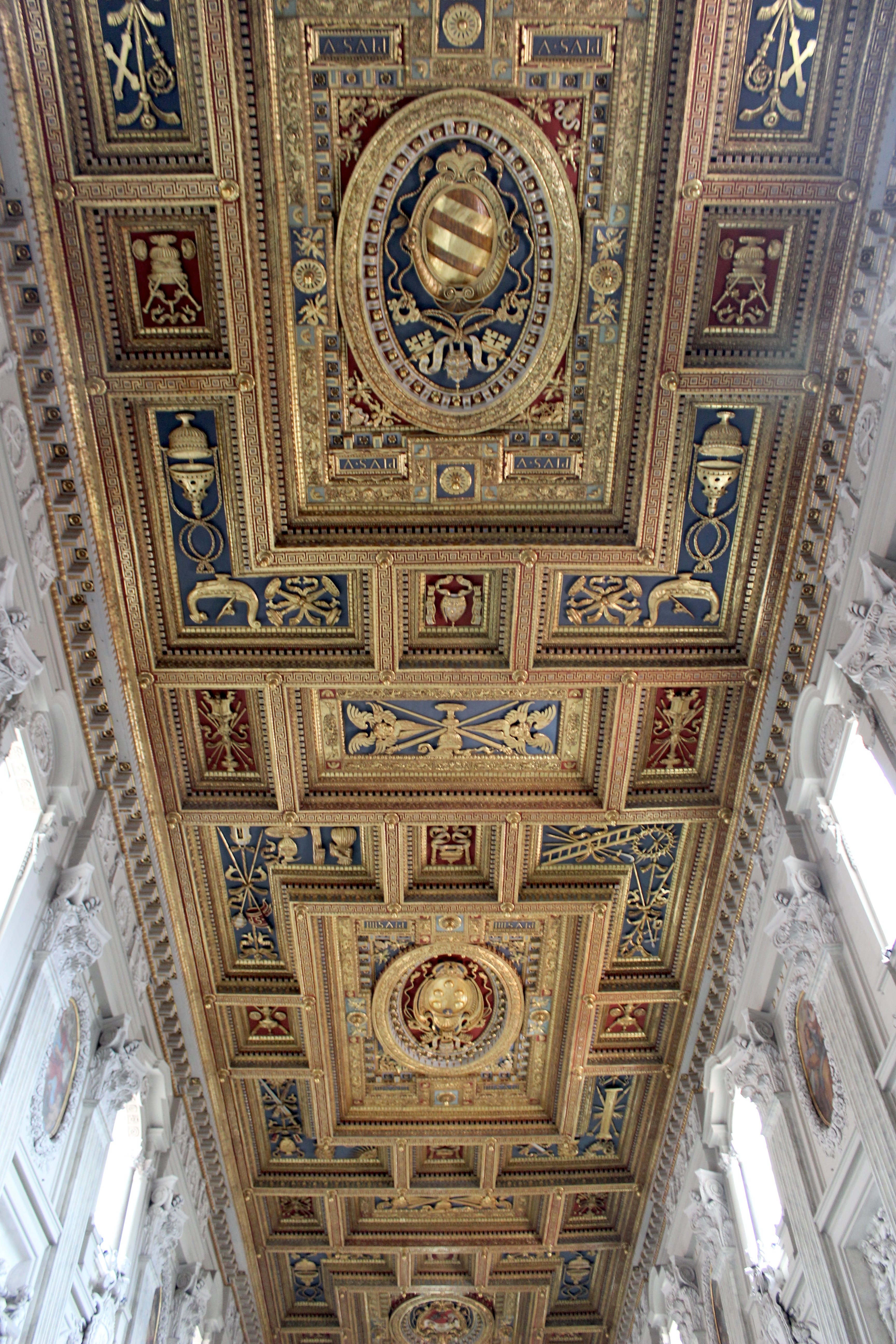 Roma. San Juan de Letrán. Techumbre de la nave central. s. XVI.